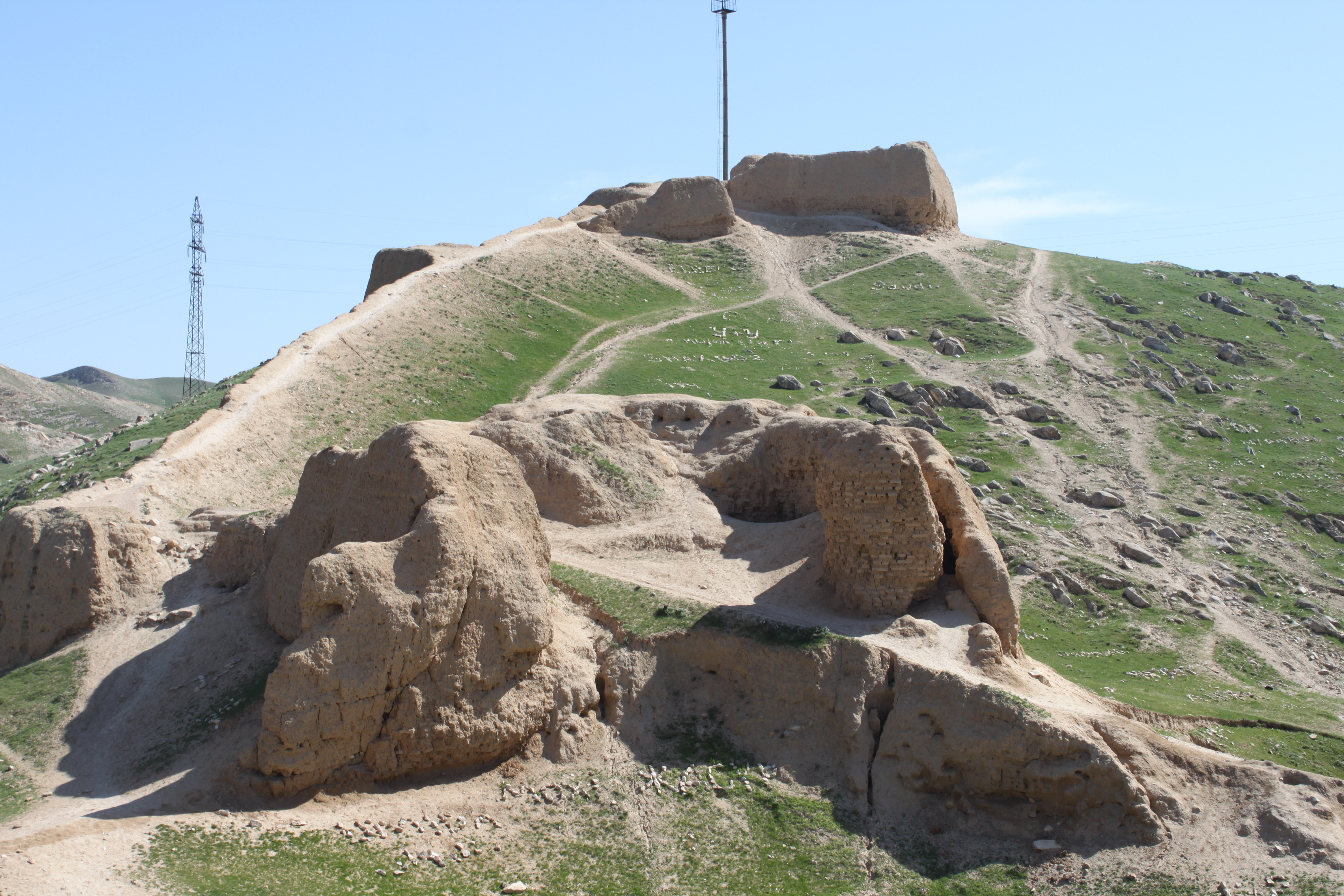 Vue sur les ruines du fort d'Alexandre le Grand à Nourata